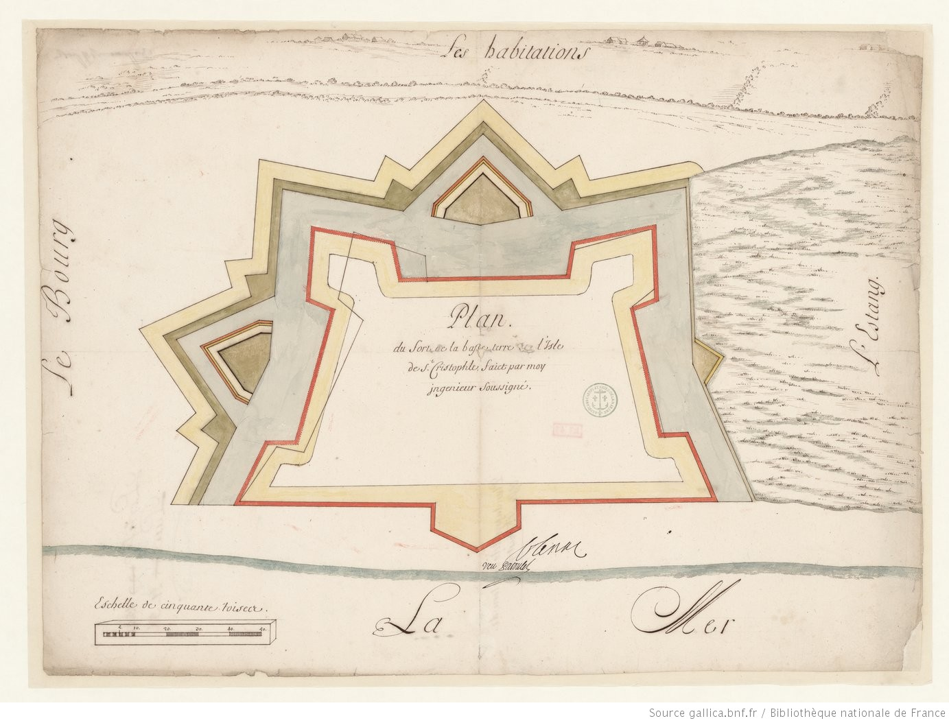 Plan du fort de la Basse terre de l'isle de St. Christophle